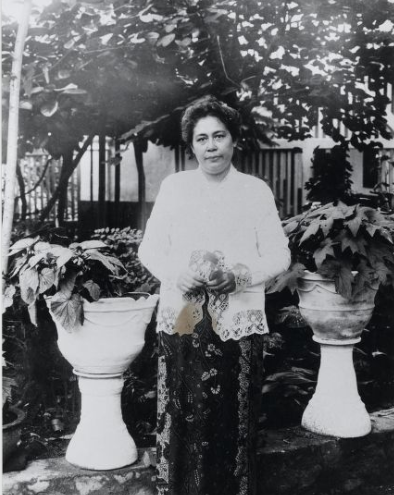 1904. Bodjongweg 80 te Semarang